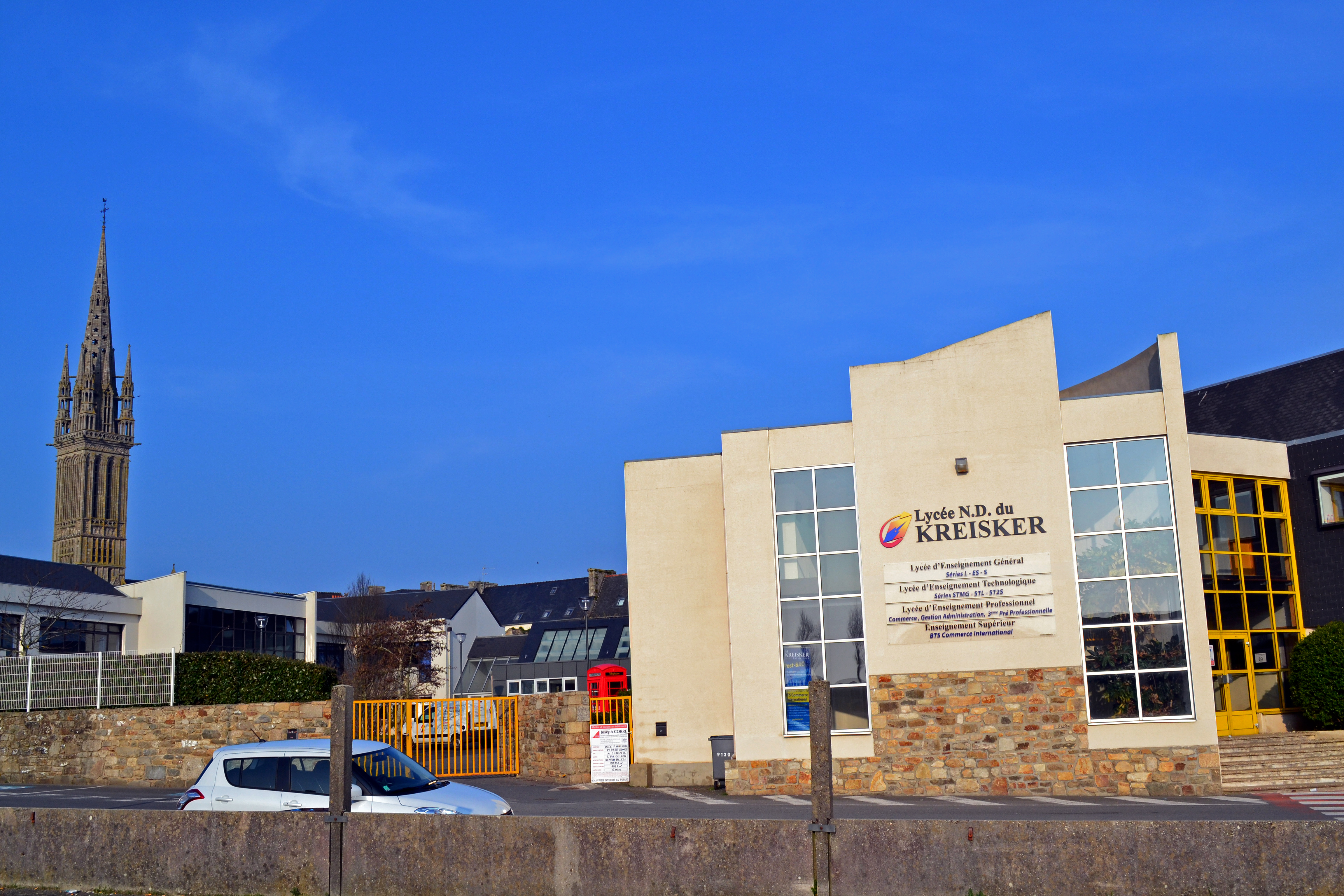 Vue des Carmes du lycée N-D du Kreisker à Saint-Pol-de-Léon (Finistère).